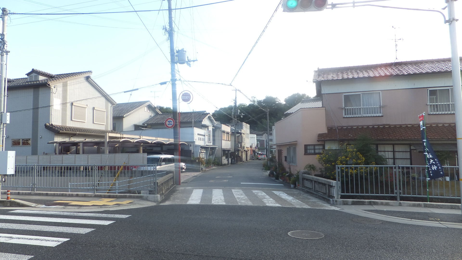 兵庫県三木市本町1丁目